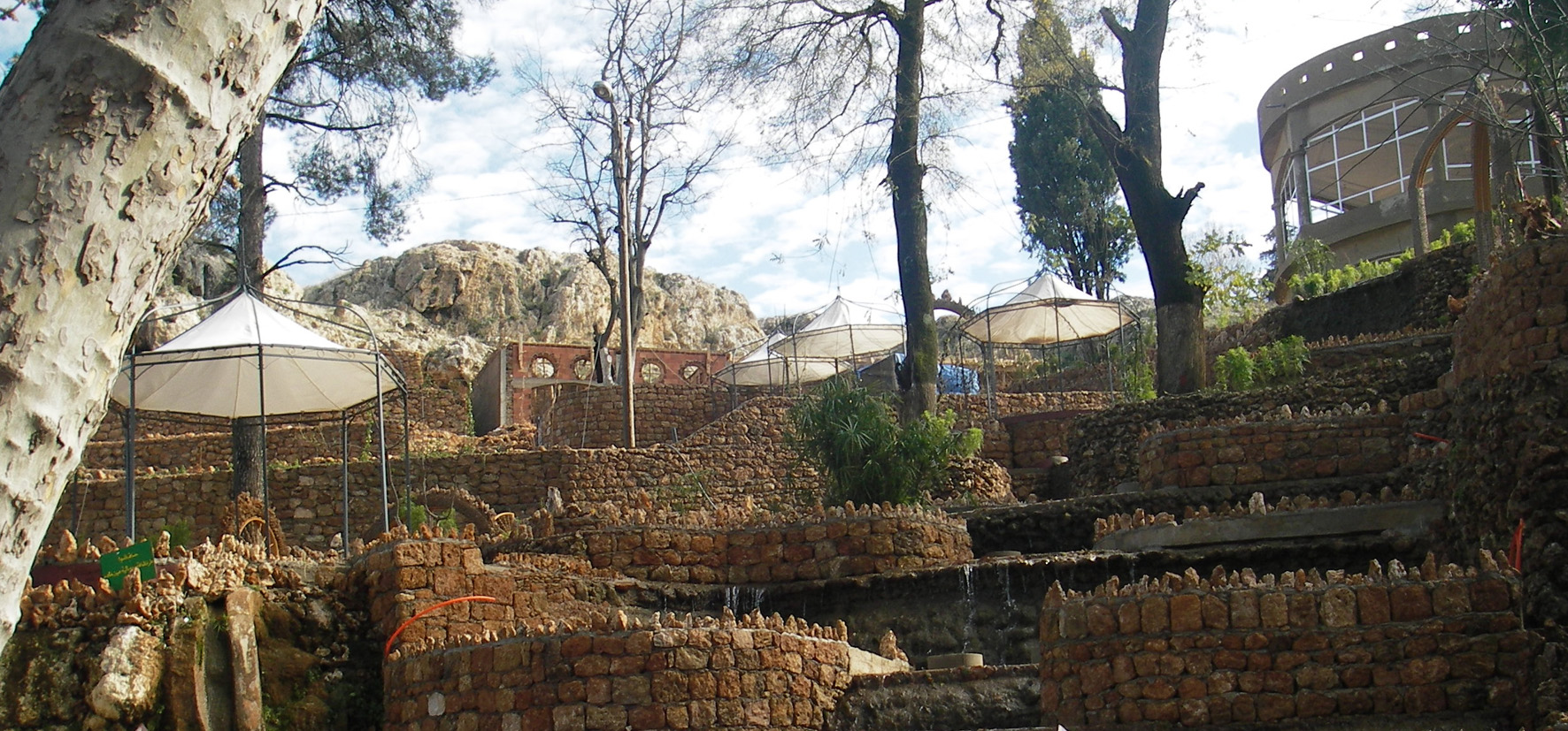 El Hajeb jardin Ain Khadem (Maroc)